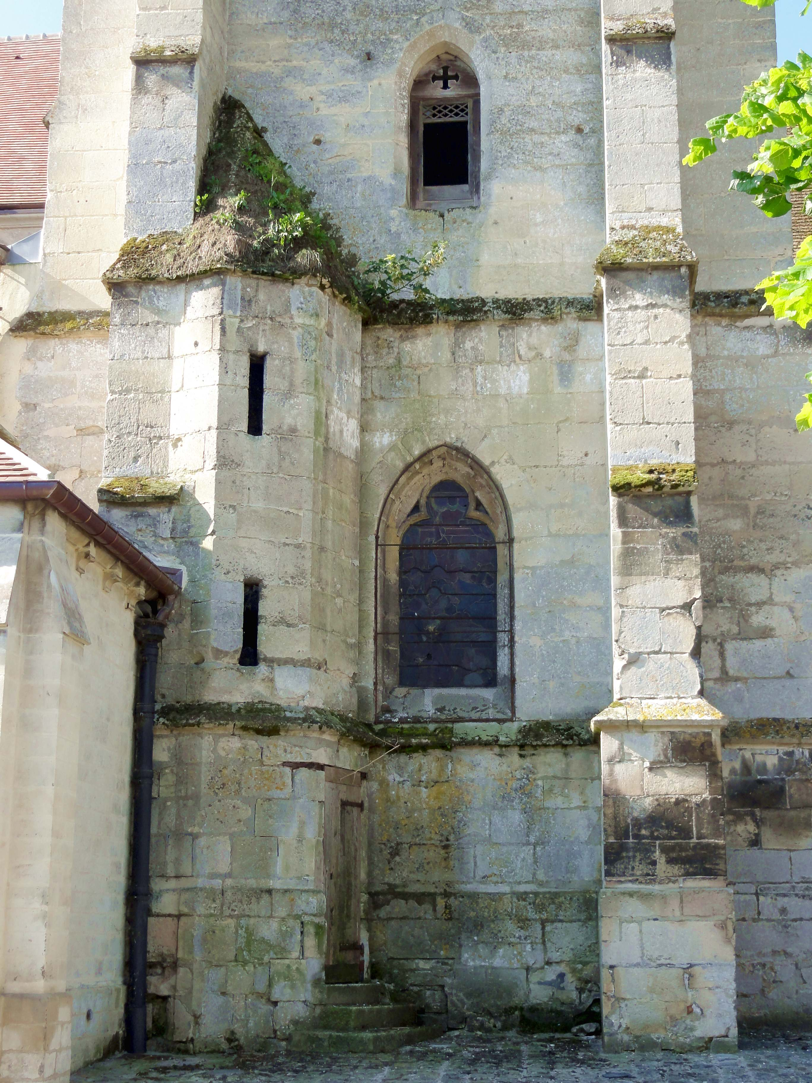 Clocher, base et 1er étage, côté nord.